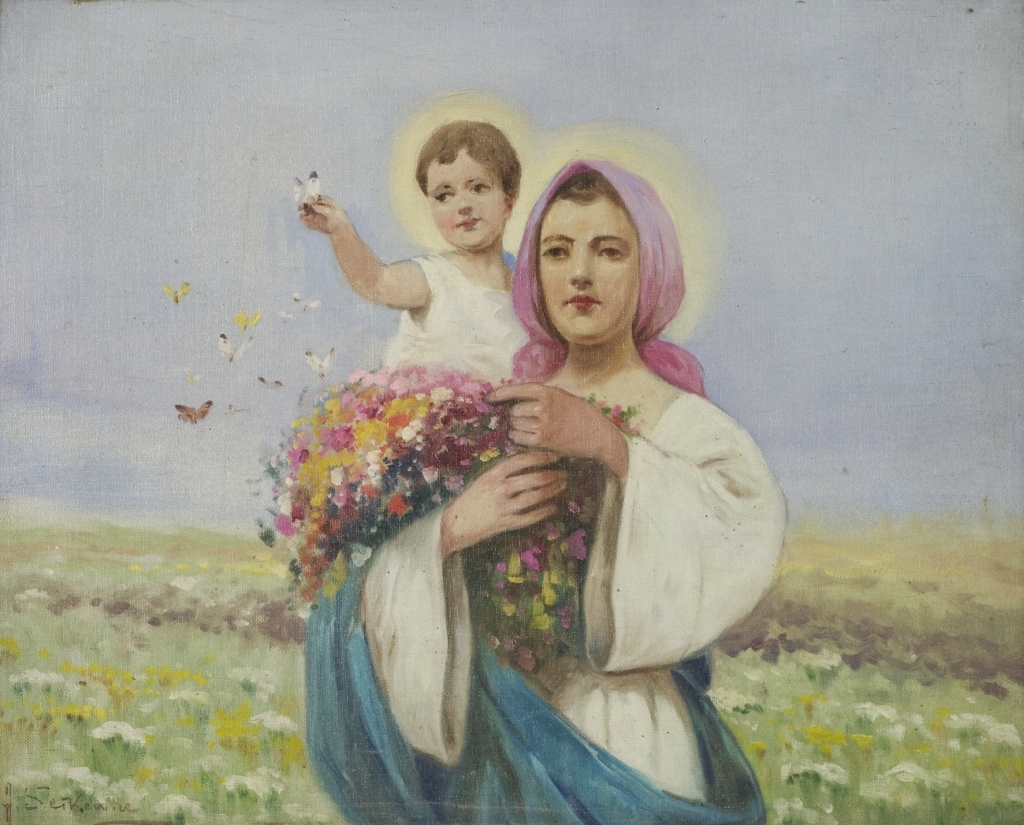 Растительная Богородица (Matka Boska Zielna)